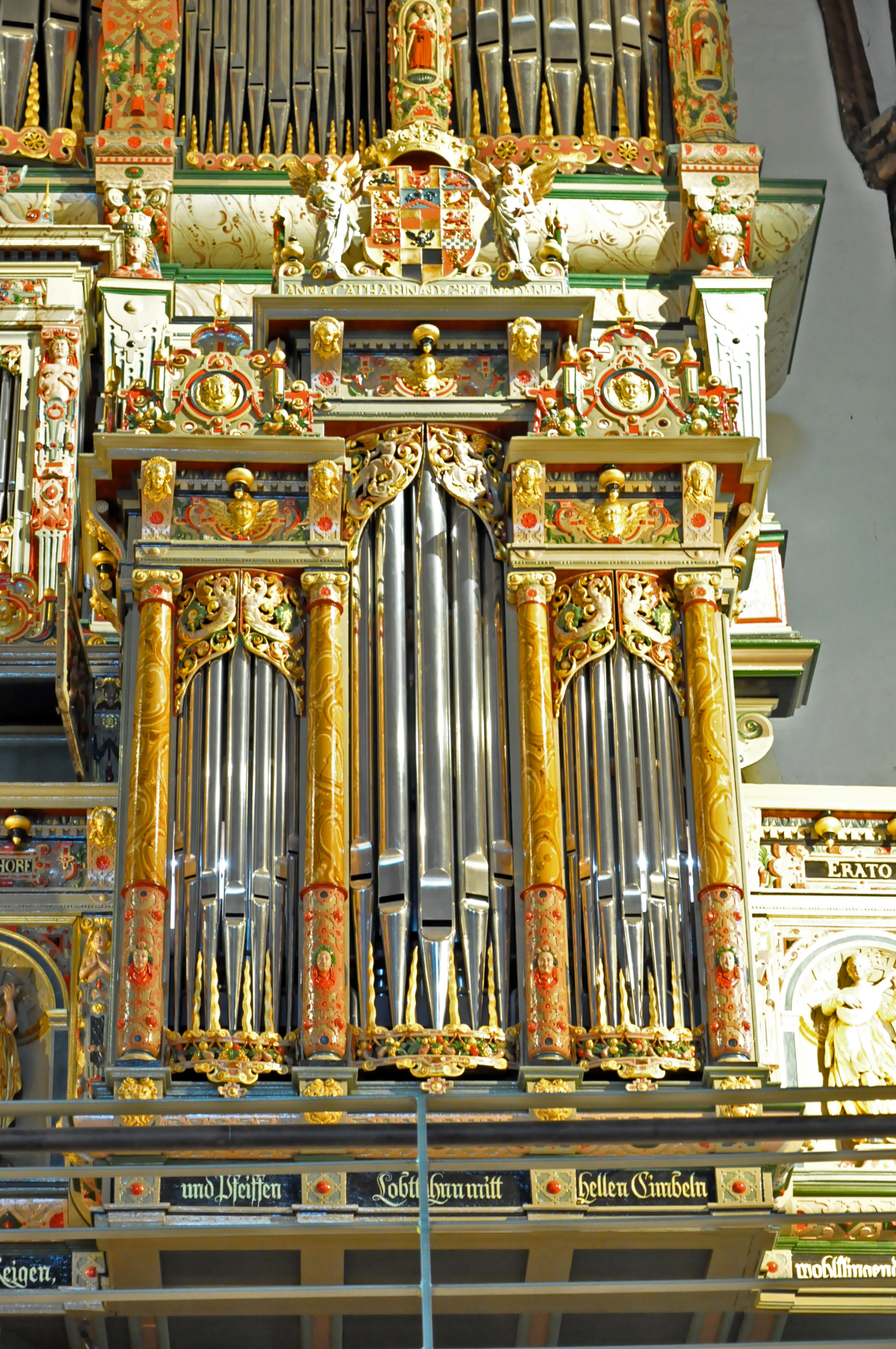 Orgel in der Nikolaikirche, Flensburg